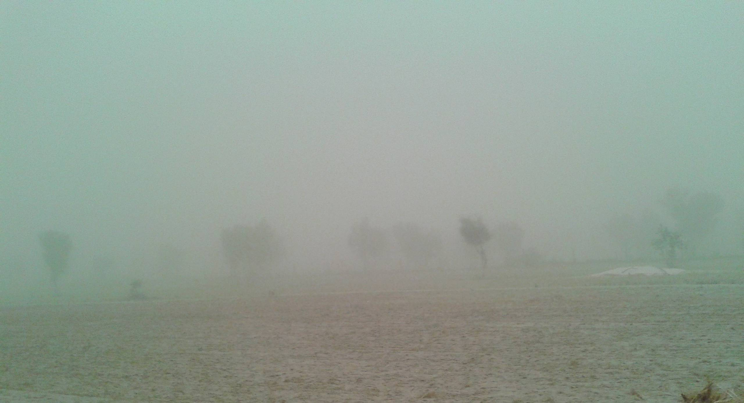 राजस्थान में आई आँधी का एक दृश्य